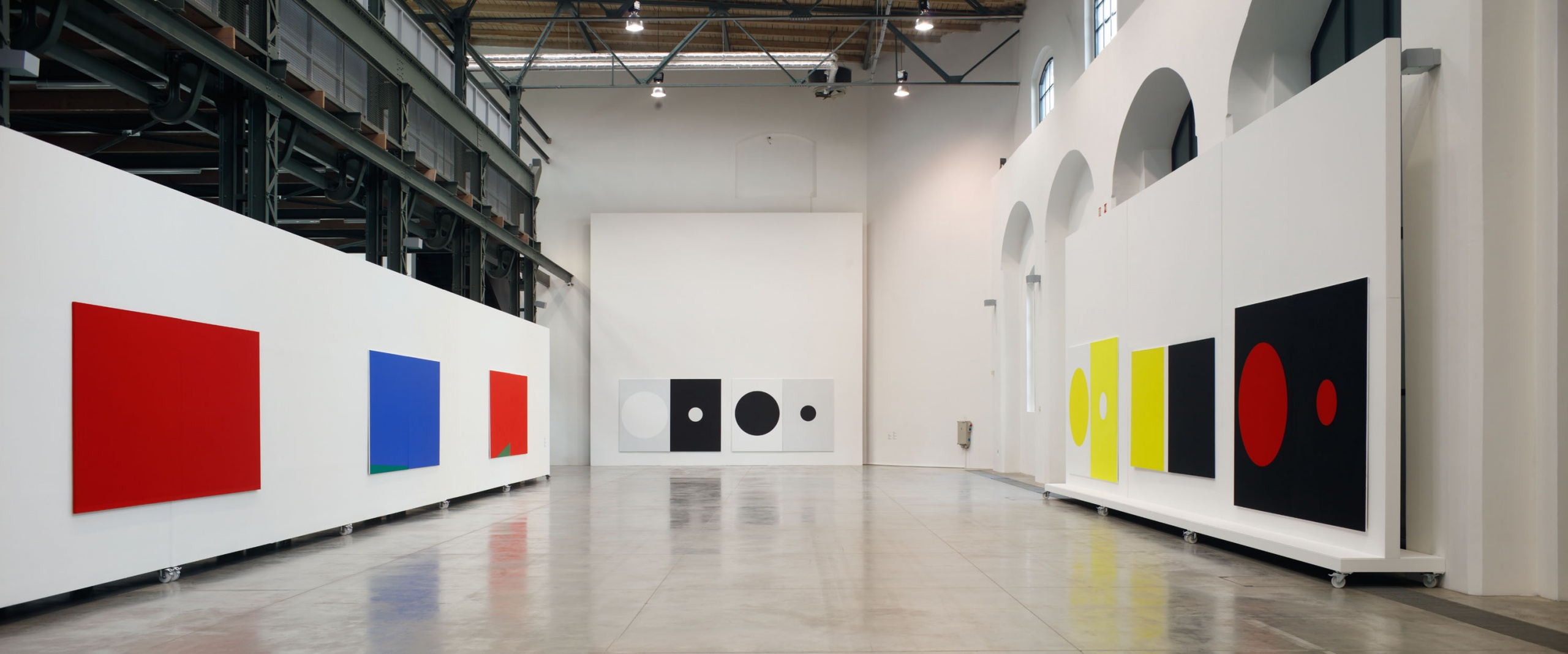 Milan Grygar, Světlo, zvuk, pohyb, Fait Gallery